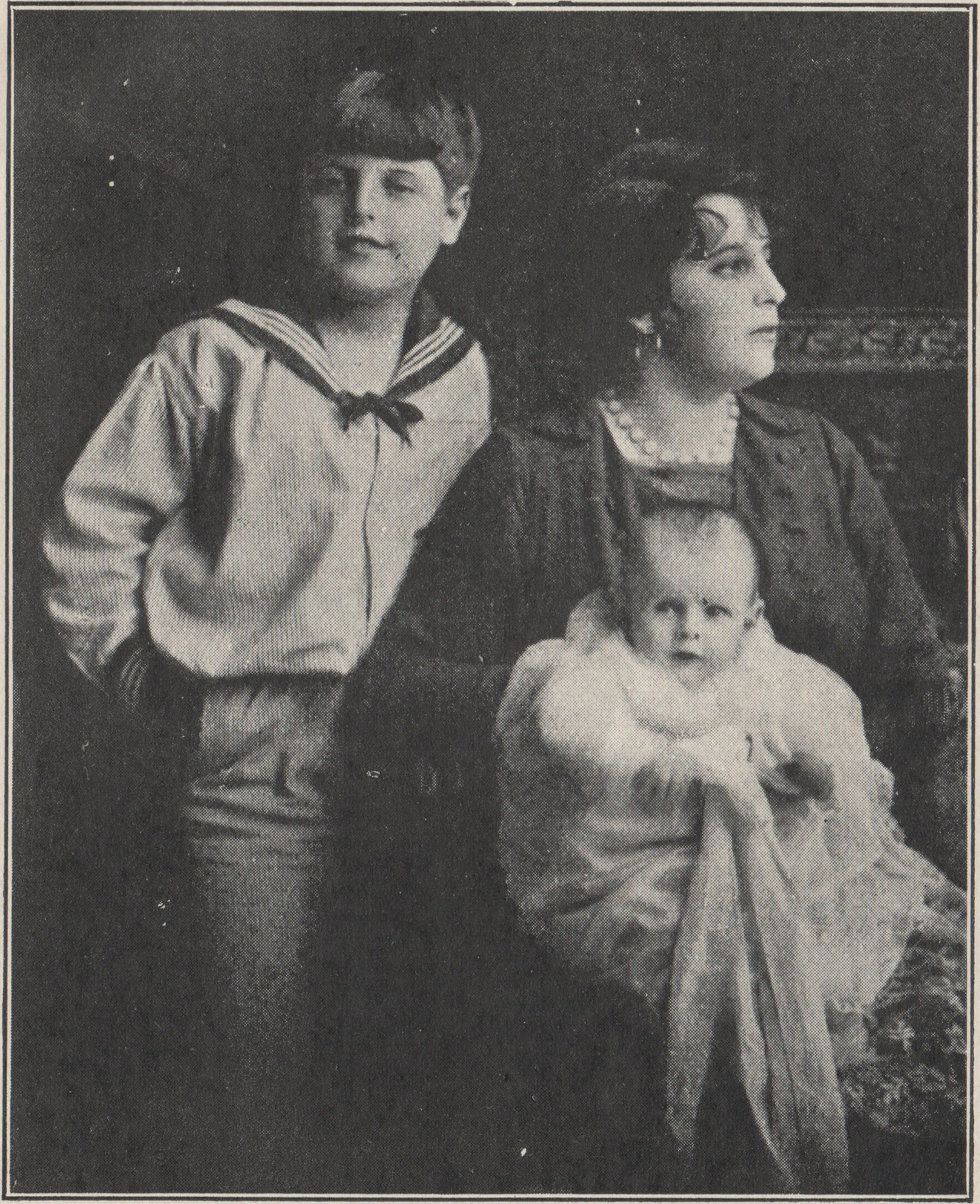 Fotografía de la escritora uruguaya María Carmen Izcua (1885-1952), publicada en su libro Frutal (1924).